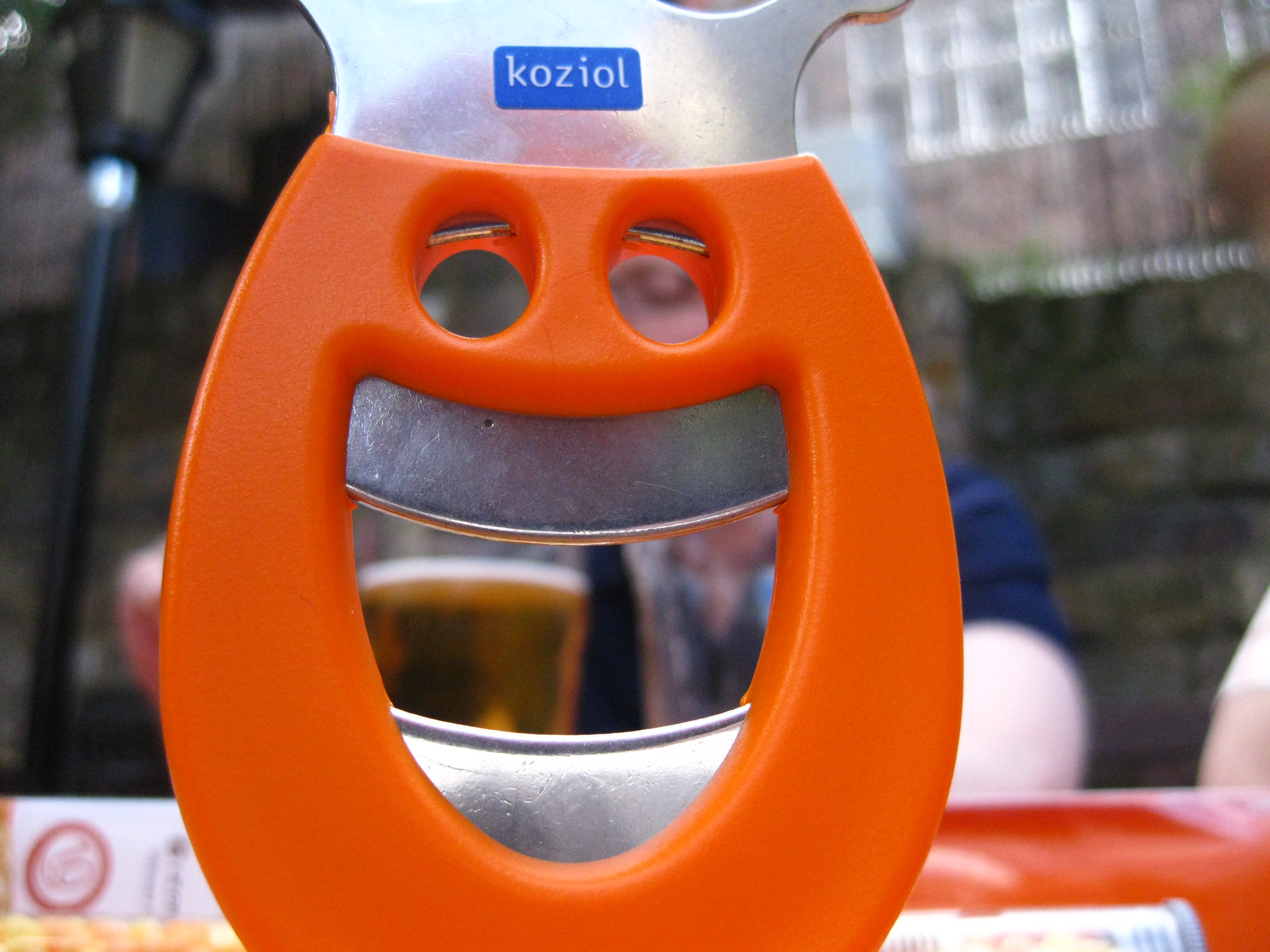 orange bottle opener koziol